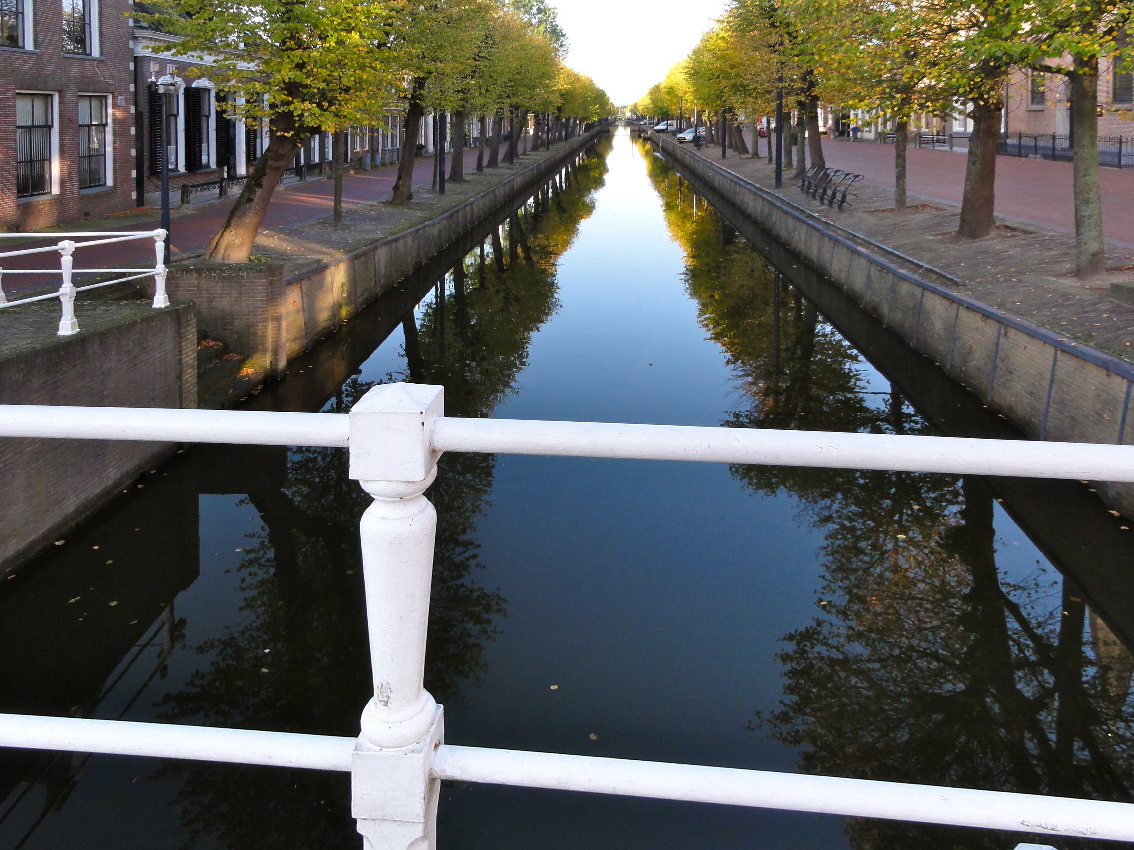 Balk met Raadhuisstraat en Van Swinderenstraat